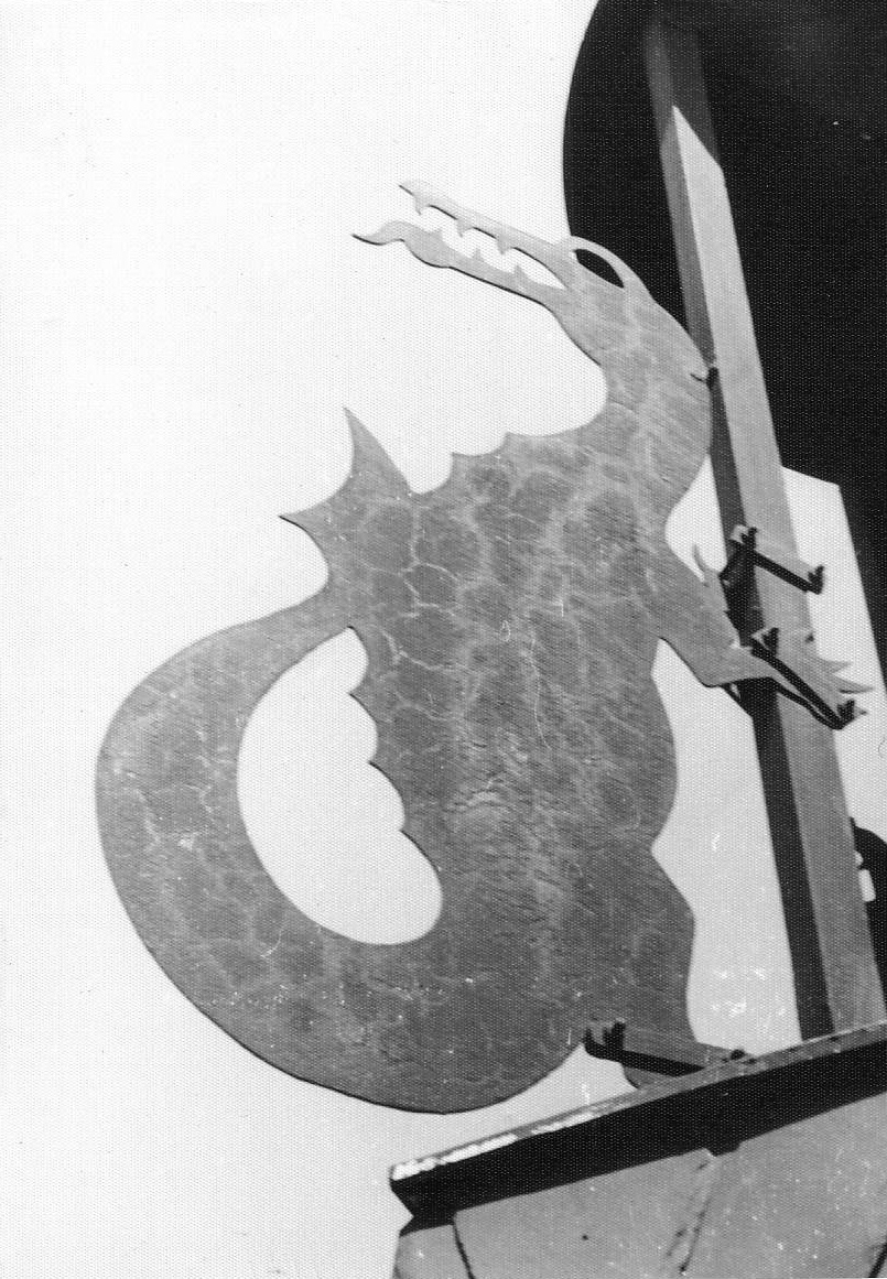 das Bild zeigt ein Fabelwesen, das zu einer Gruppe von vier ähnlichen Figuren am Dachreiter des Gebäudes der Fakultät Erziehungswissenschaften der TU Dresden gehört